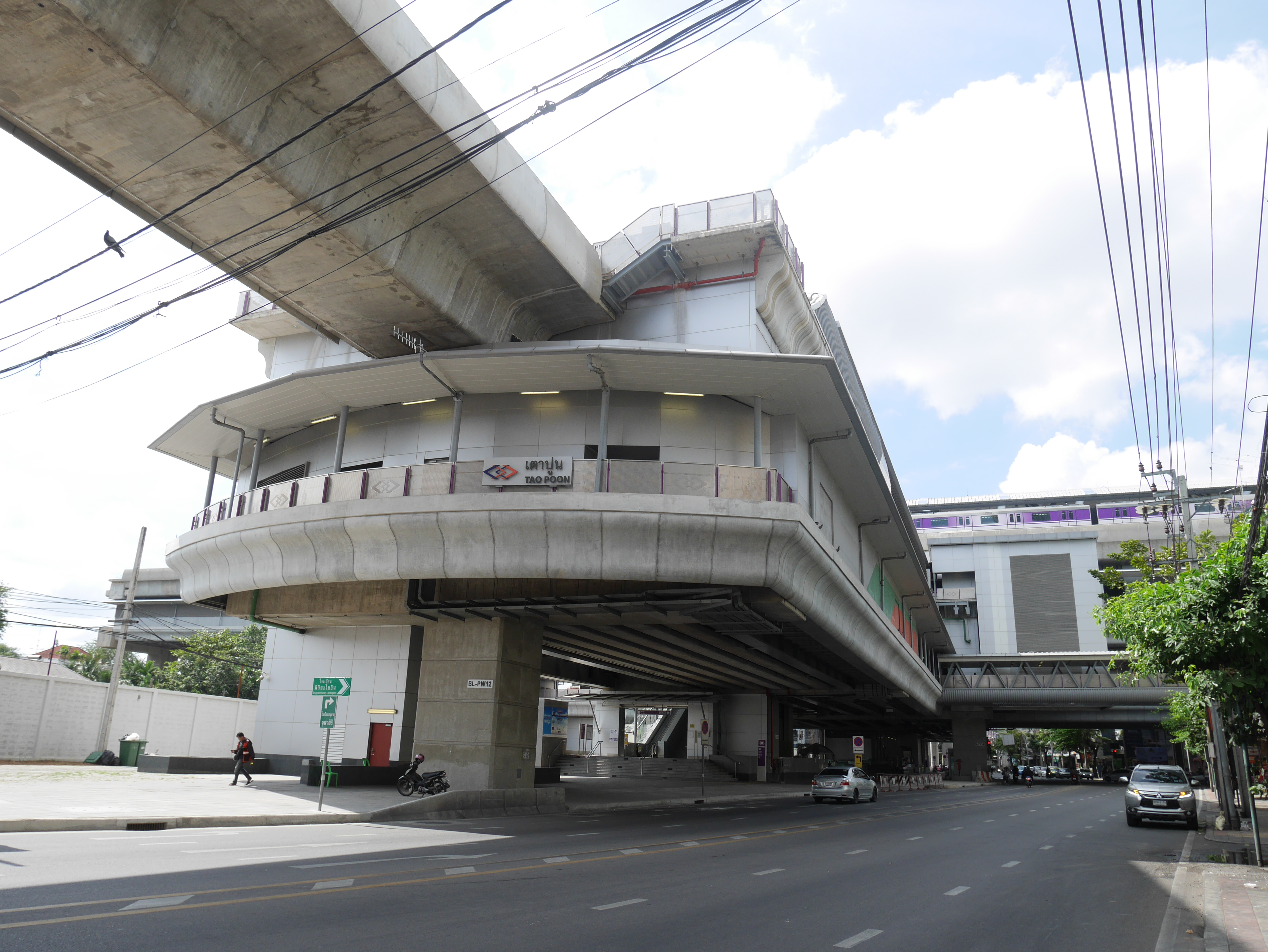 バンコ・メトロのタオプーン駅。 手前はブルーラインのホーム（背面はバーンスー駅方面）、奥はブルーラインホーム。